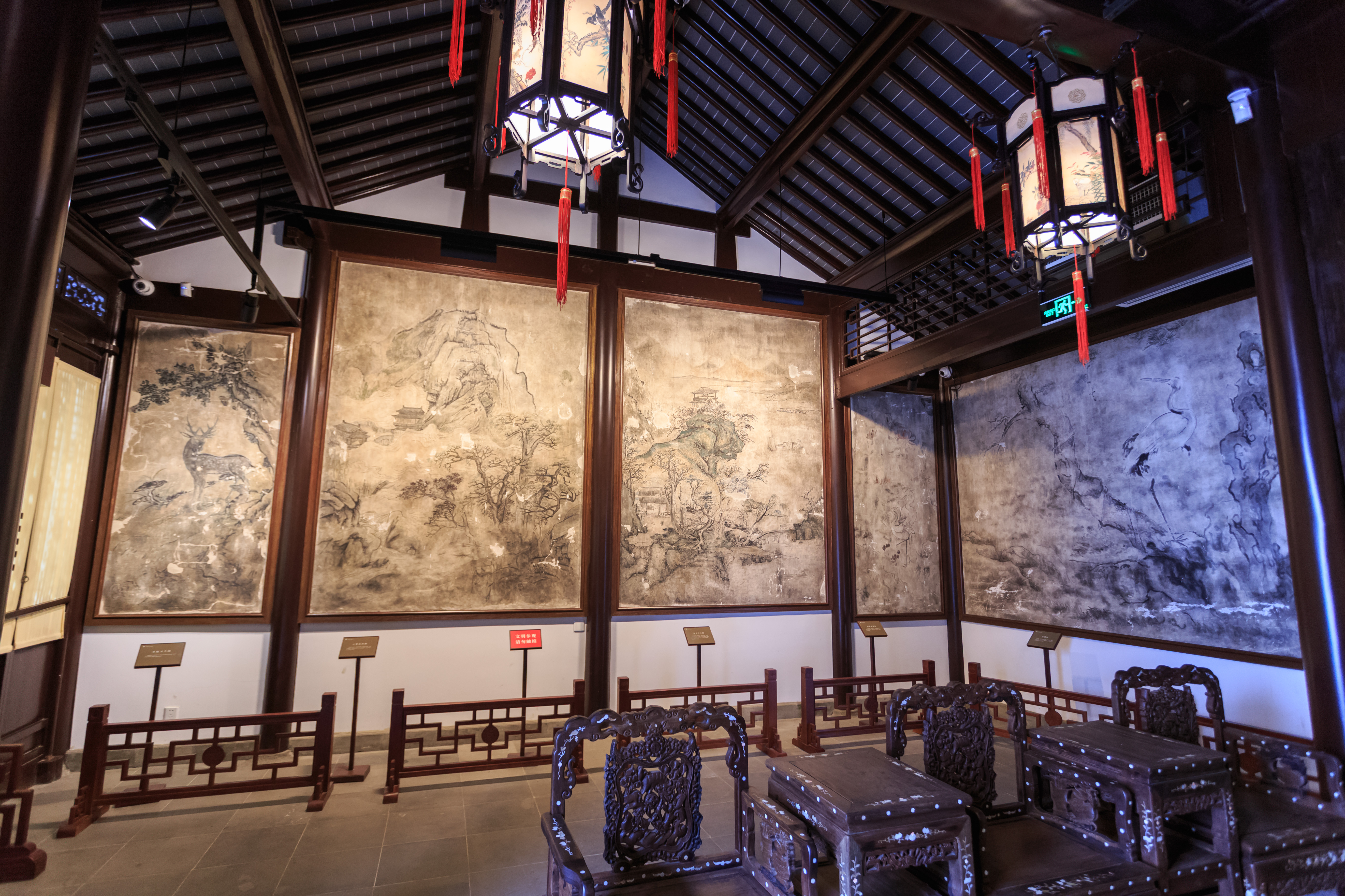 堂子街太平天国壁画 壁画一厅